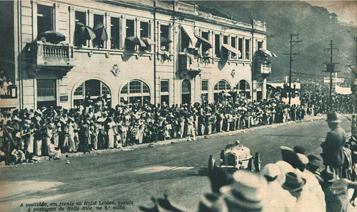 Grande Prêmio Cidade do Rio de Janeiro de 1936, a "baratinha" da corredora Hellé Nice passa diante do Hotel Leblon.